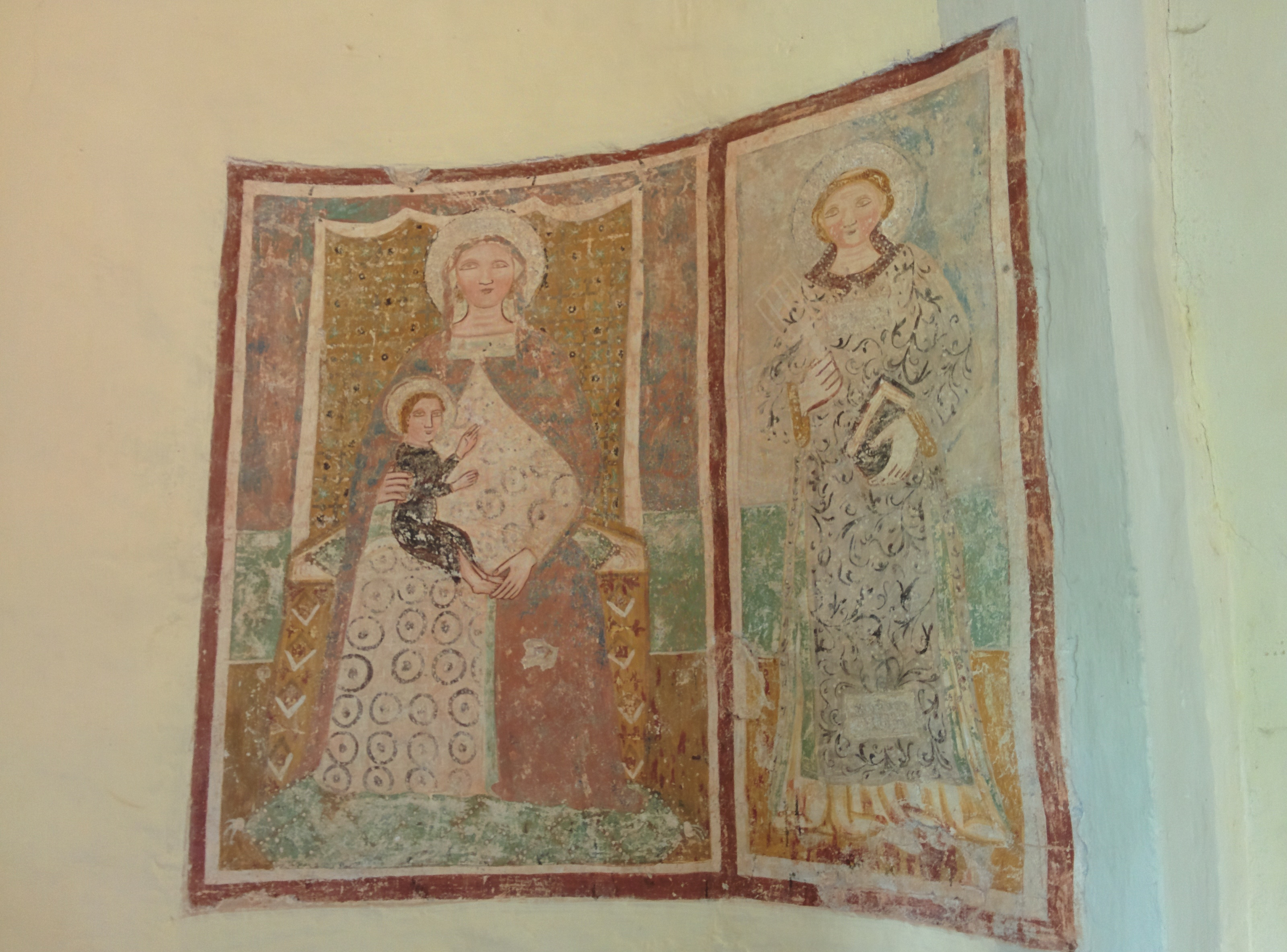 Affreschi raffiguranti la Madonna, il Bambino e San Lorenzo nella chiesa di San Lorenzo a Castelnovo di Isola Vicentina, in provincia di Vicenza.